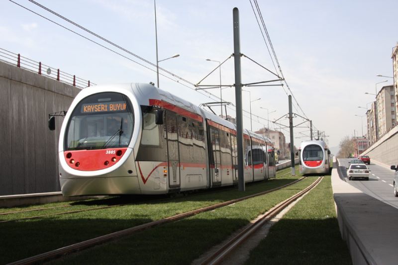 Kayseray